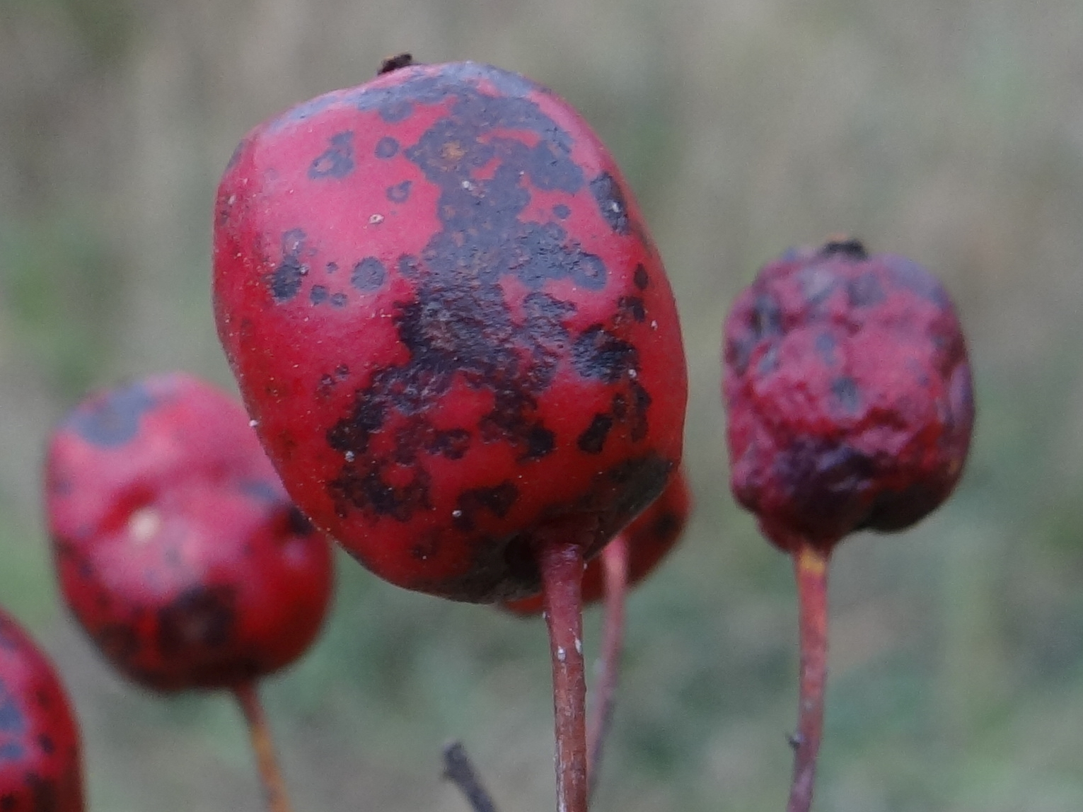 Venturia crataegi on Crataegus sp. Location: Poland, Trzciana, województwo małopolskie